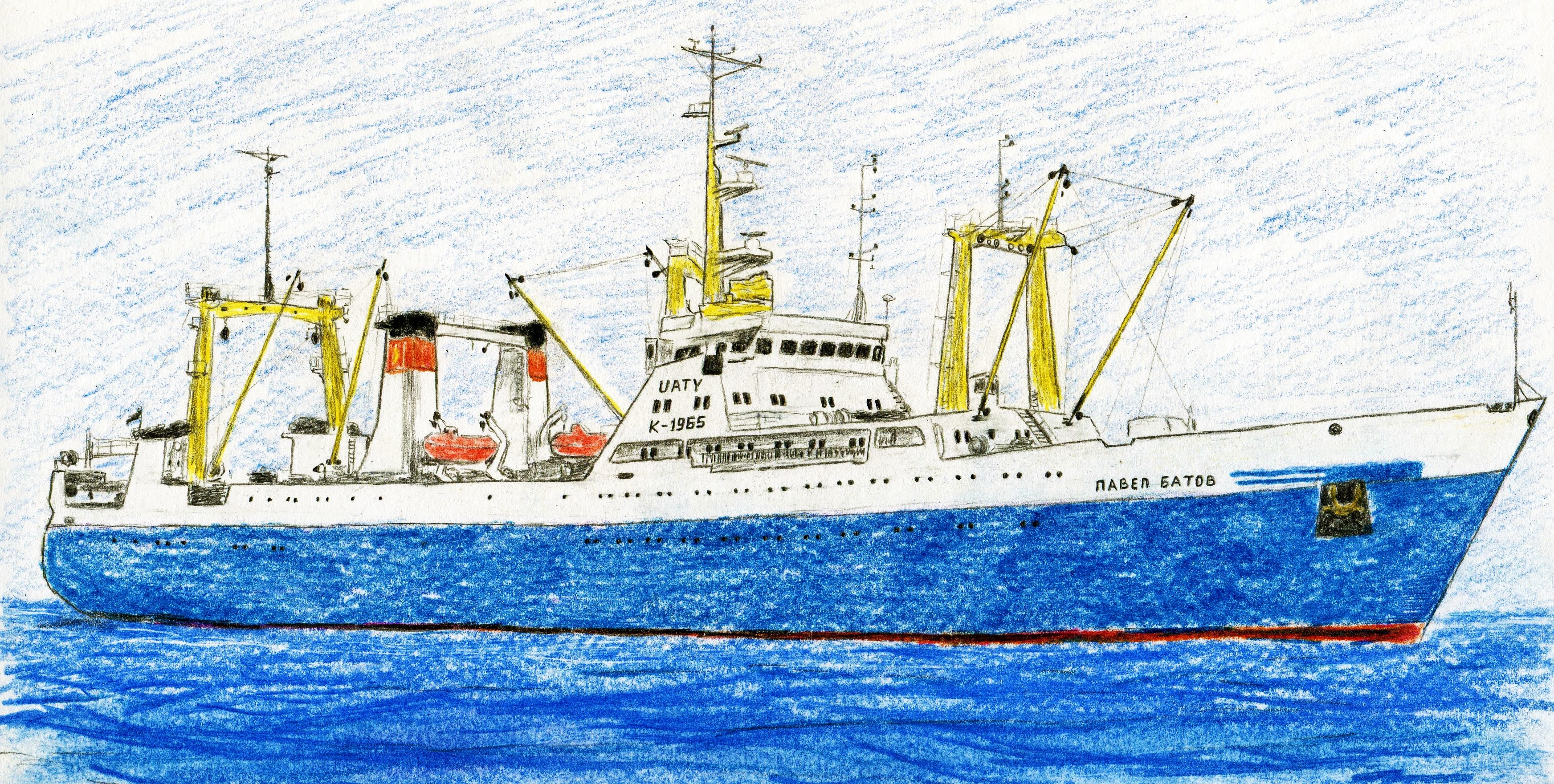 Большой автономный траулер морозильный "Павел Батов", тип "Пулковский меридиан"